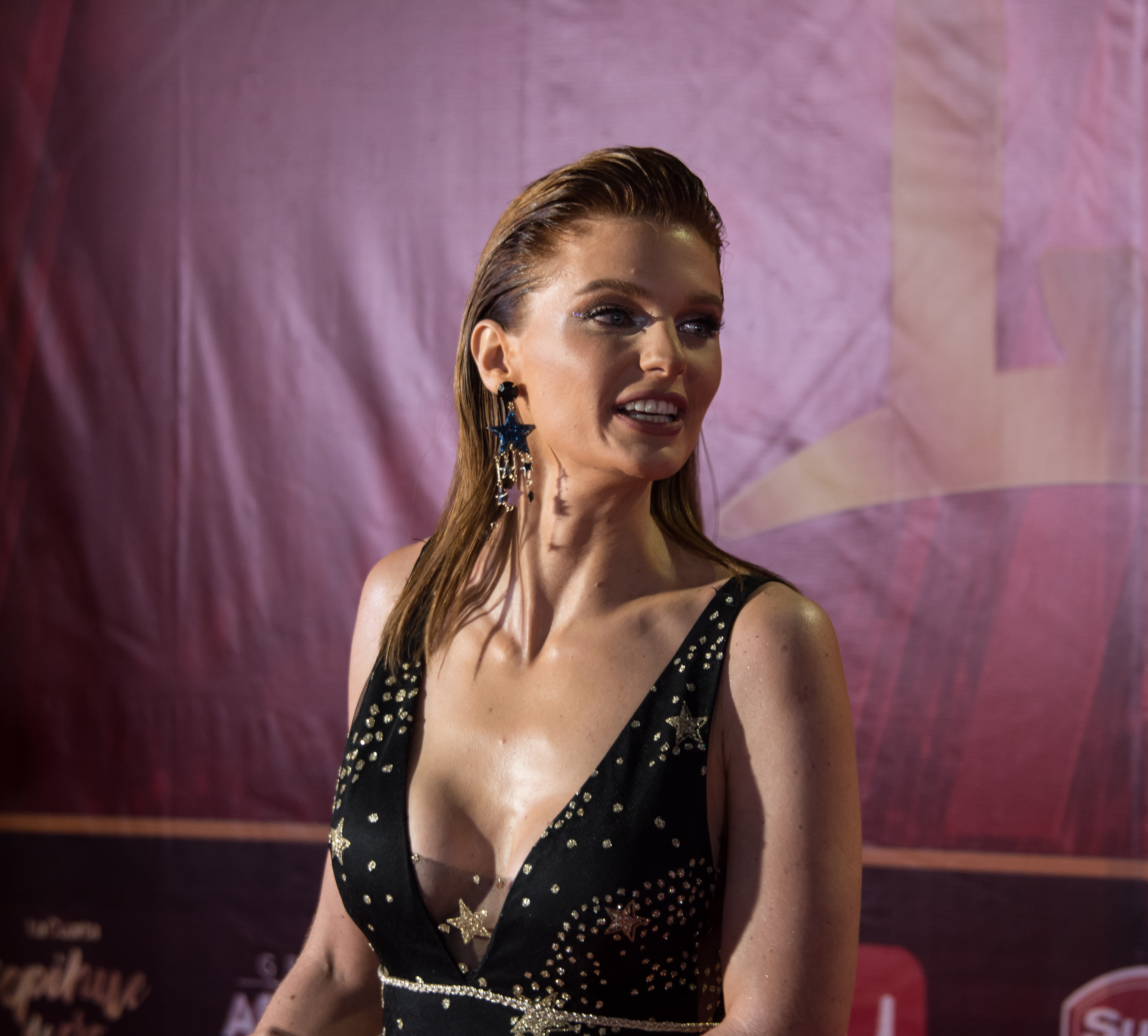 Josefina Montané, Copihue de Oro 2018, Sun Monticello, Mostazal, Región de O'Higgins, Chile